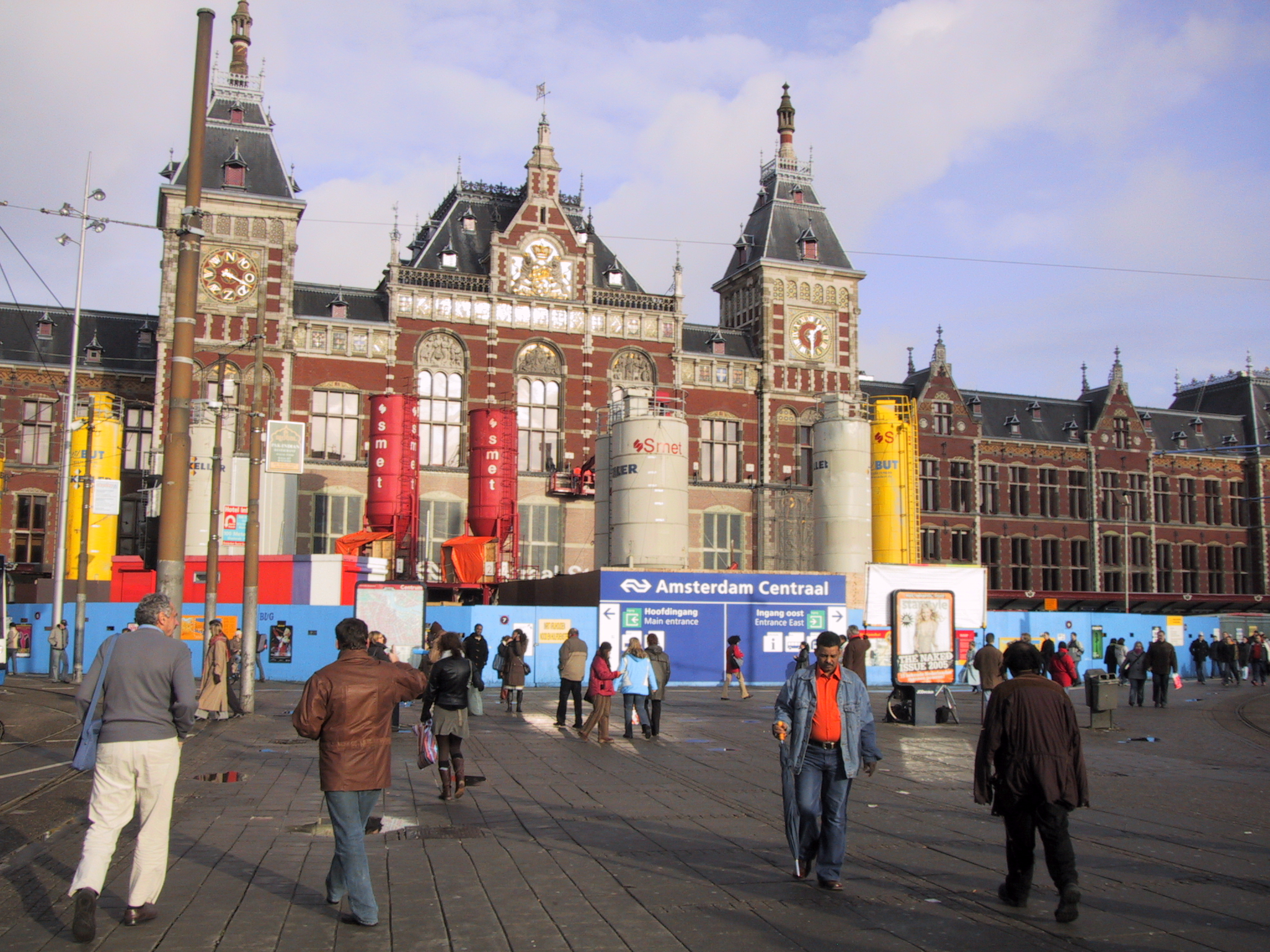 Me - 26/11/2005 - AMS Central station